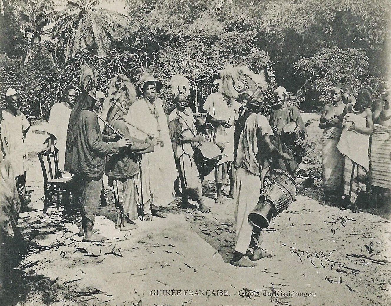 Griots du Kissidougou. pas de mention d'auteur, d'éditeur ou de date Guinée française.